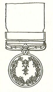 Scan van Blz. 198 van het boek "Handbuch der Ritter- und Verdienstorden " uitgegeven 1893 door Weber.Tekening van de in 1902 overleden Maximilian Gritzner. Robert Prummel 10 jul 2008 16:40 (CEST)